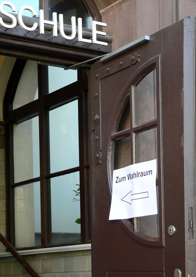 Landtagswahl in Niedersachsen 2017, Tür eines Wahllokals in einer Schule